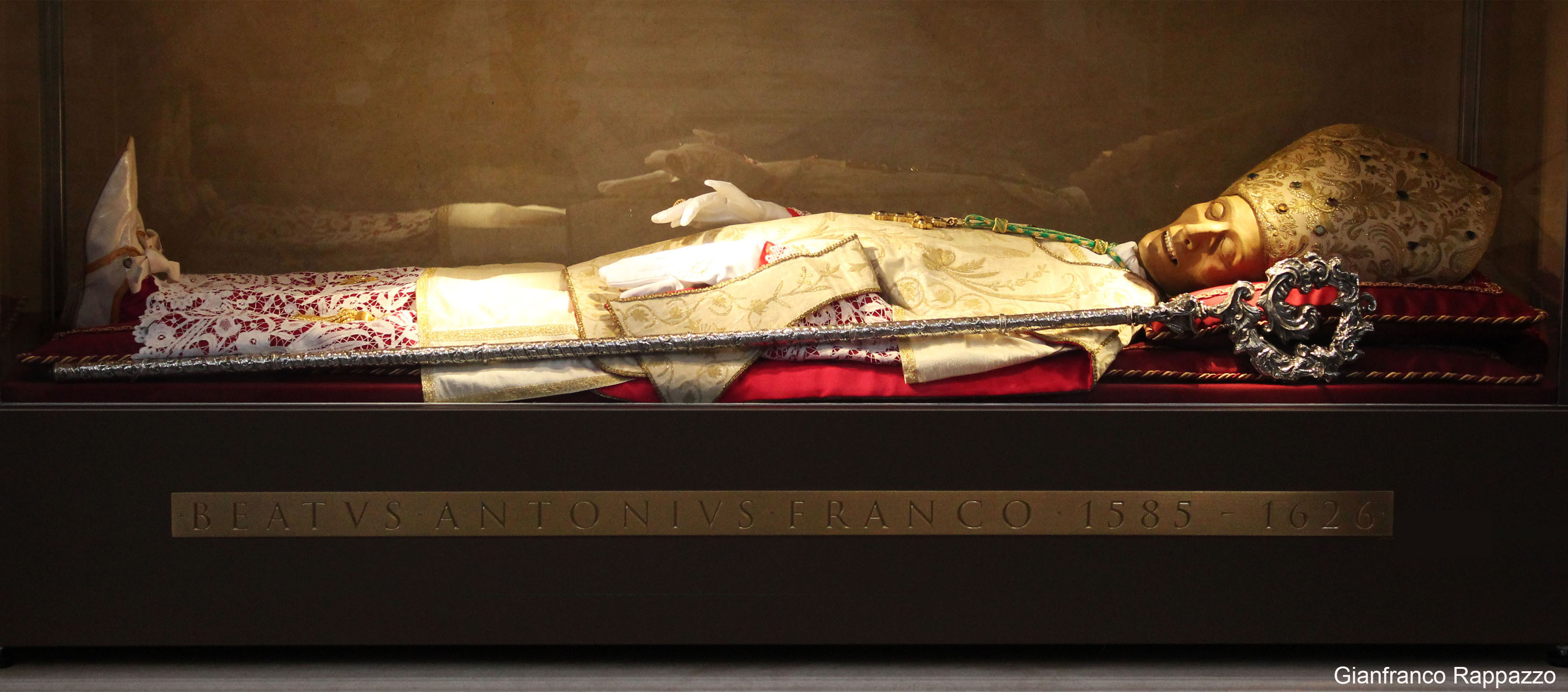 Simulacro Mons. Antonio Franco